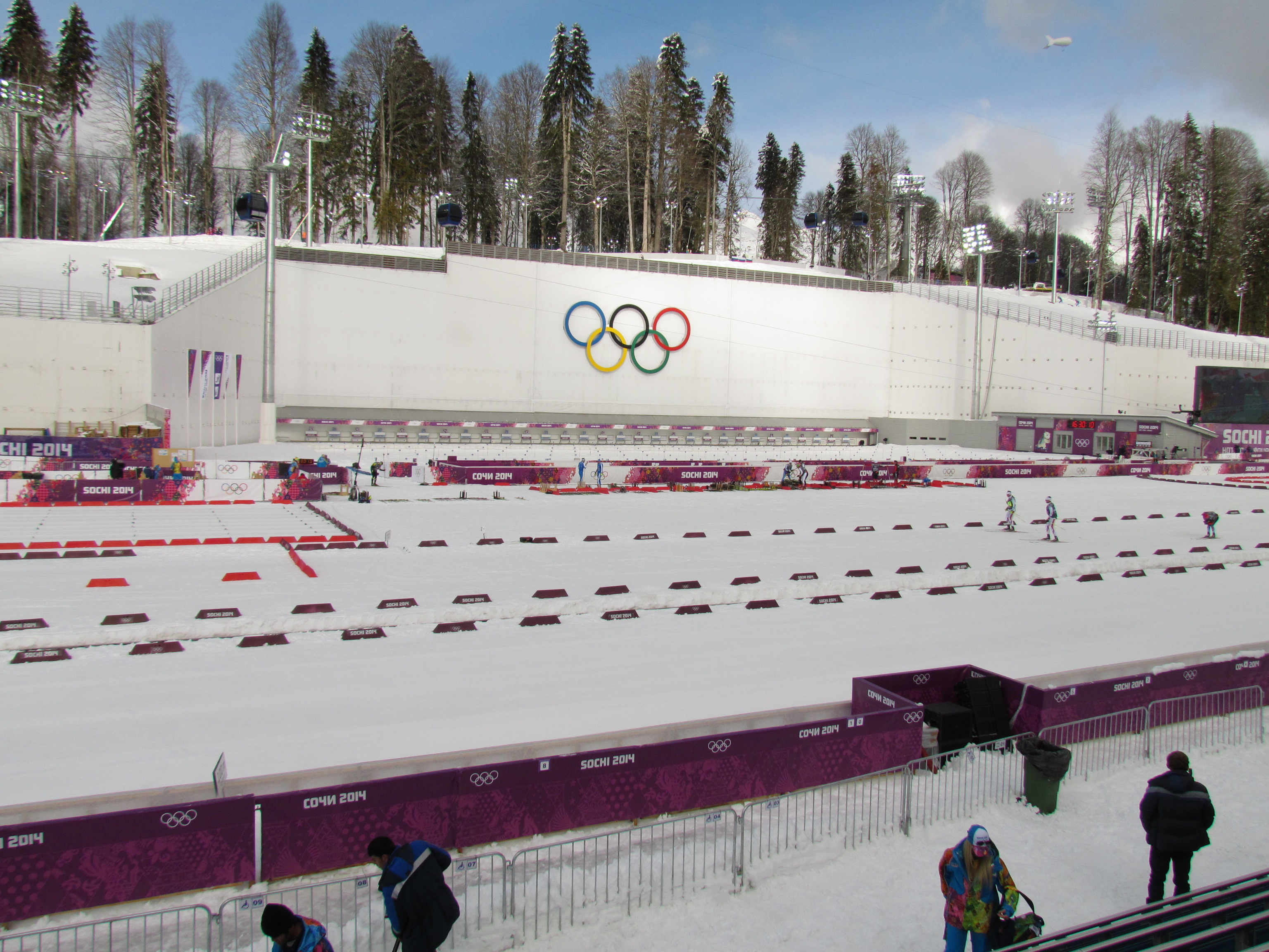 Лижно-біатлонний комплекс «Лаура» (смт Красна Поляна, Сочі, Краснодарський край) під час Олімпійських ігор